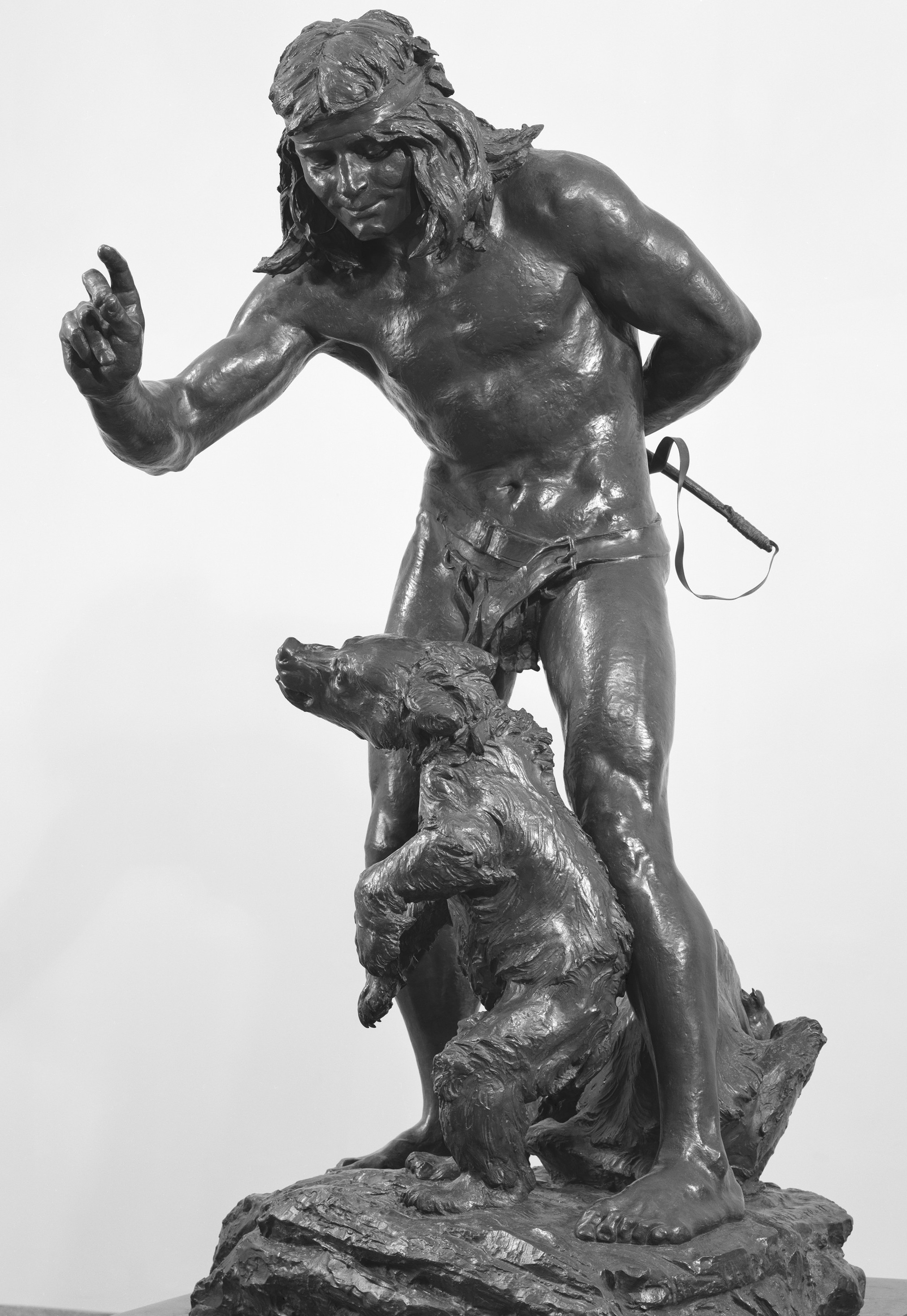 Sculpture; Sculpture